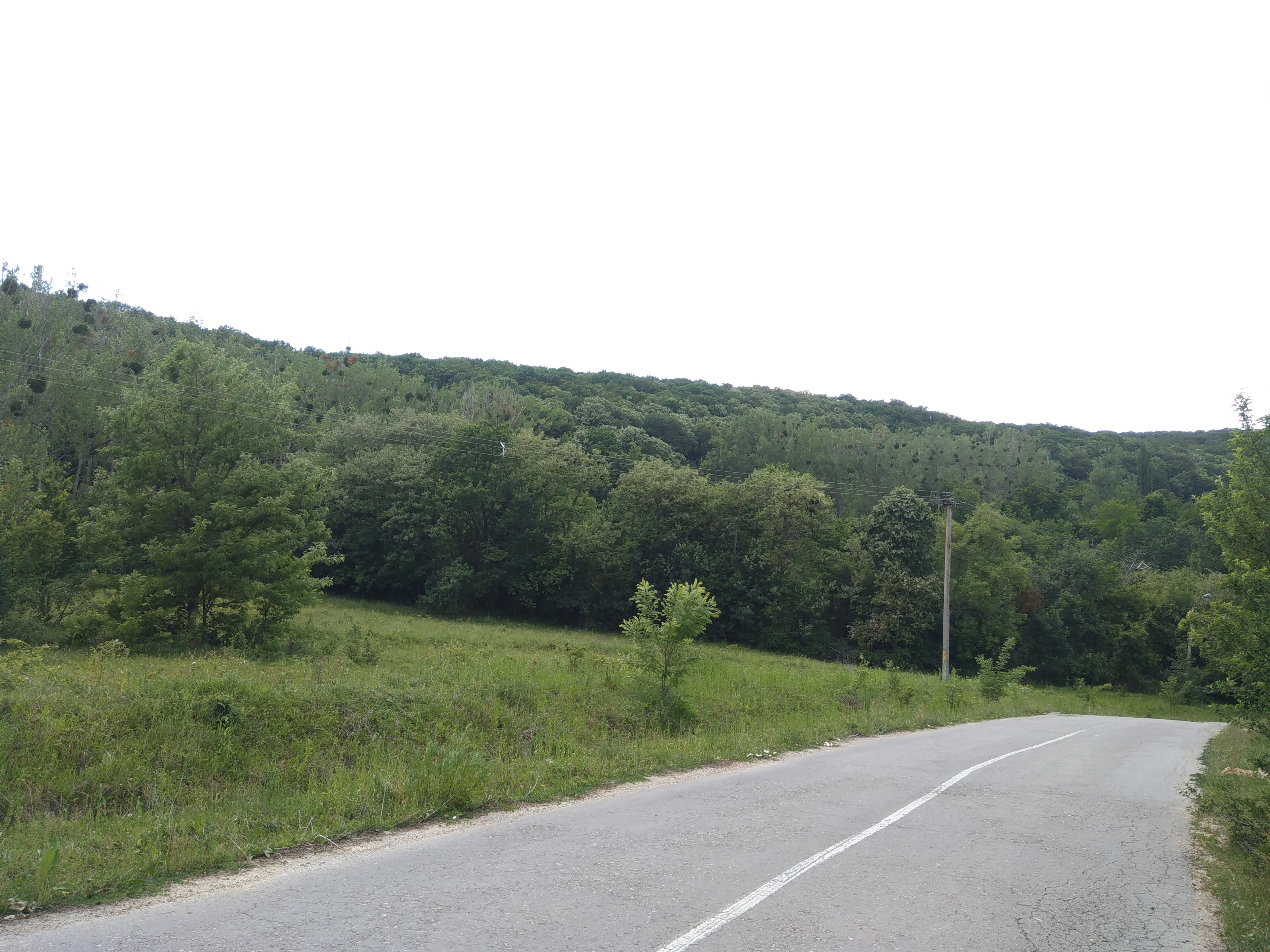 Căpriana – Scoreni, monument al naturii amplasat în raionul Strășeni, între satele Lozova, Vorniceni, Pănășești, Trușeni, Cojușna, ocolul silvic Căpriana, Căpriana, parcela 21, subparcelele 7-14; parcela 27, subparcelele 4-13; parcela 33, subparcelele 2, 3, 5; parcelele 28-30, 34-36; ocolul silvic Scoreni, Scoreni, parcelele 1-8 (cod MD-ST-rp-037)